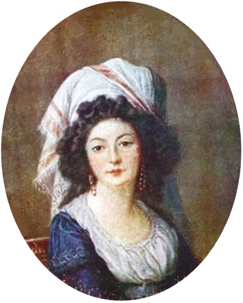 Portrait of Adélaïde-Edmée Prévost, Mme de La Briche (1755-1844)